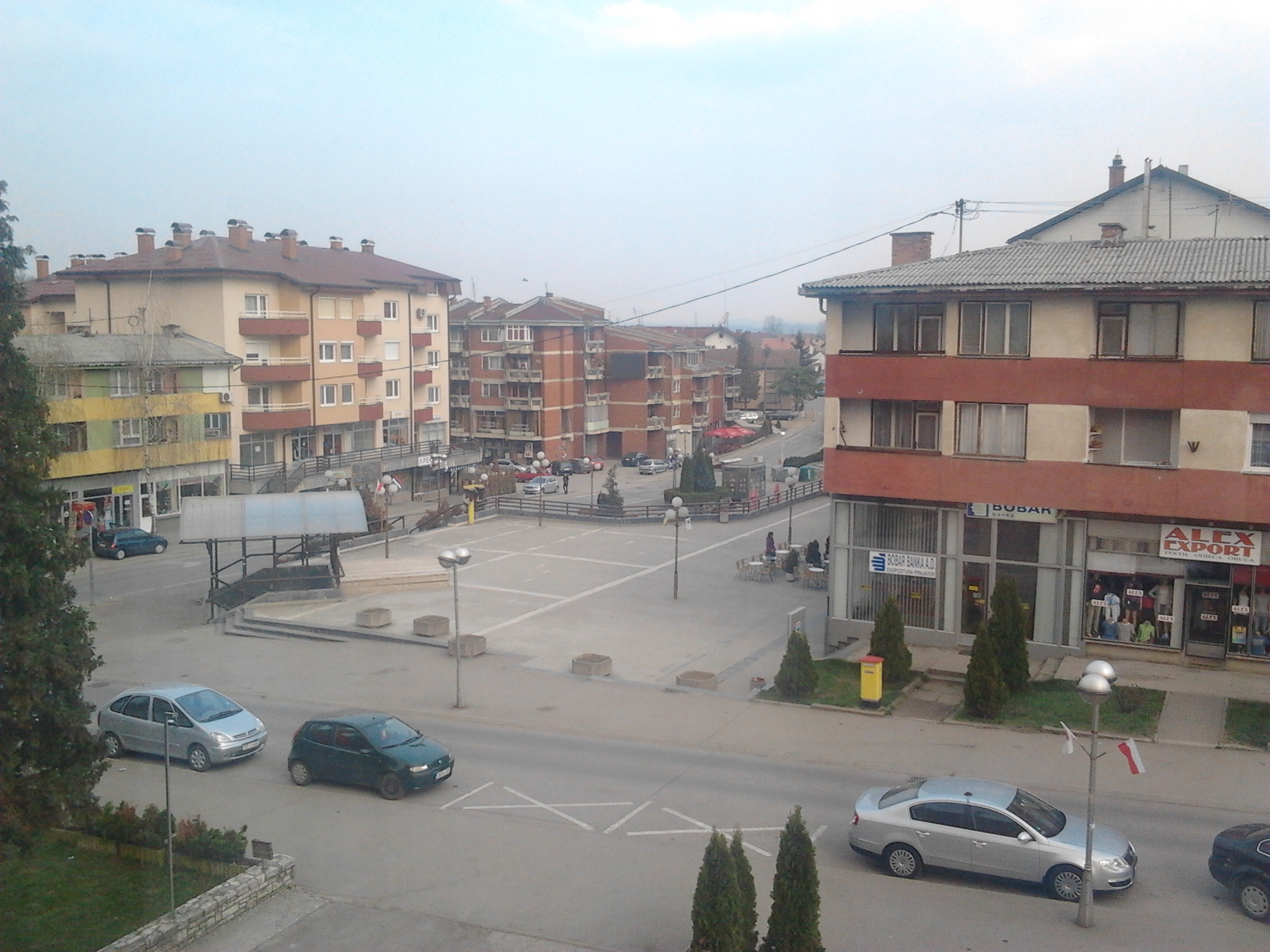 Prnjavor city from Bosnia and Herzegovina